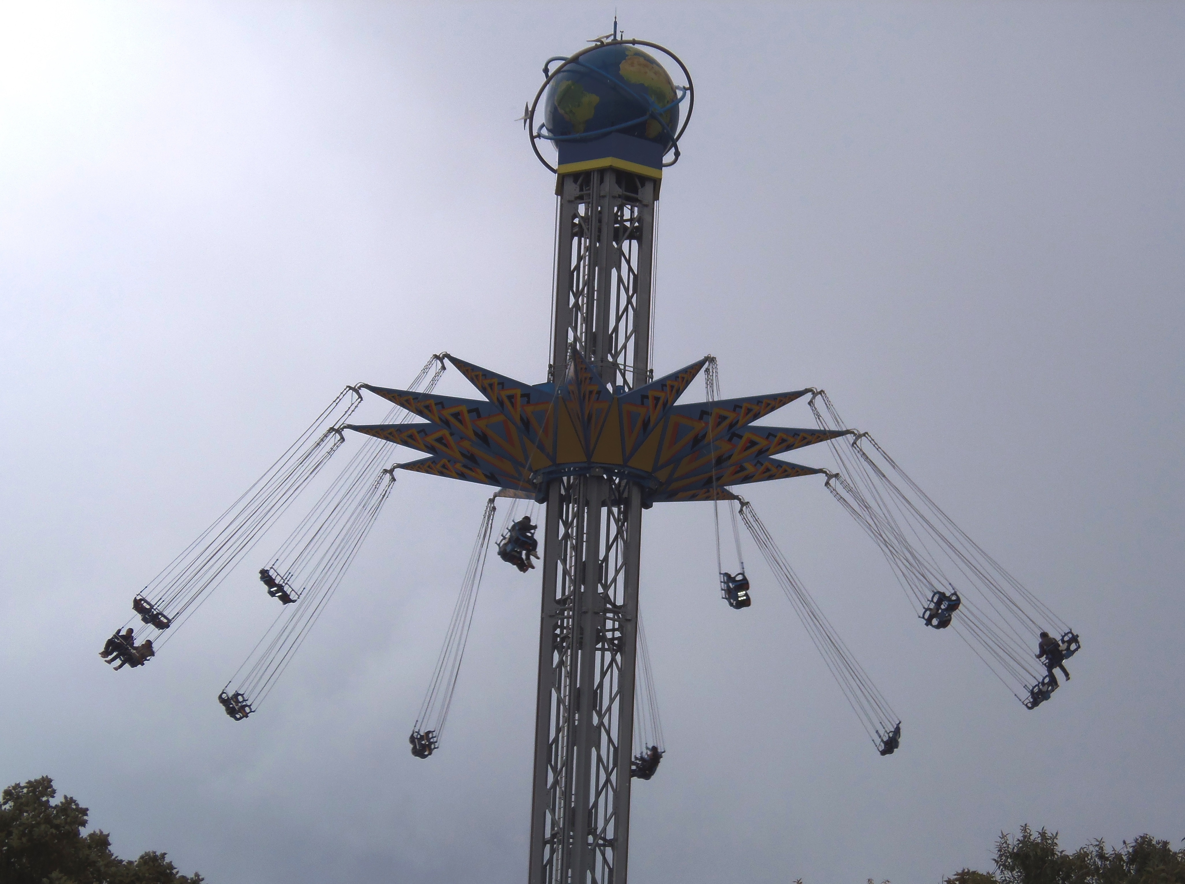 香川県丸亀市綾歌町にあるNEWレオマワールドのアトラクション「バードフライヤー」